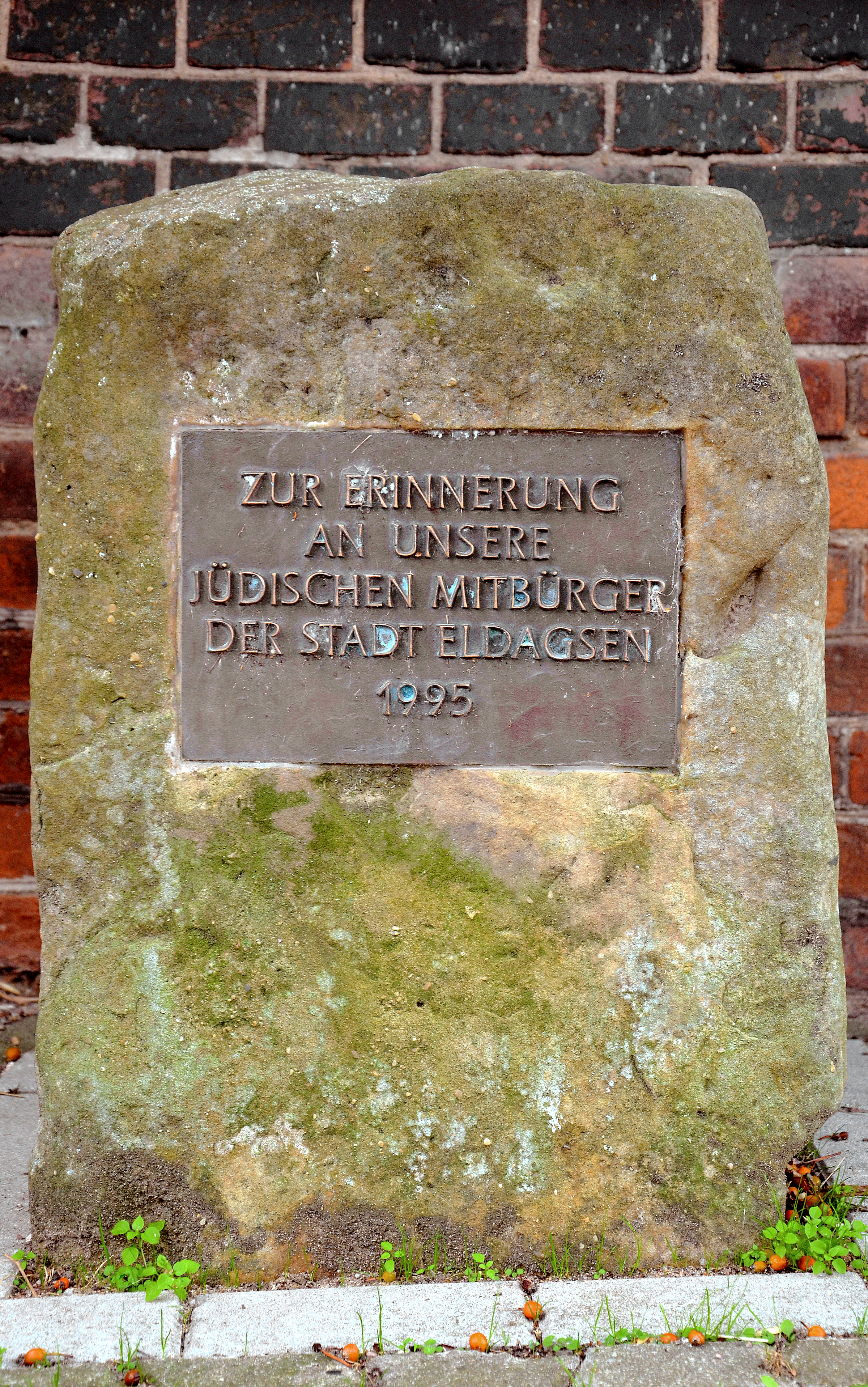 Gedenkstein vor der ehemaligen Synagoge in Eldagsen mit einer Inschriften-Tafel: „Zur Erinnerung an unsere jüdischen Mitbürger der Stadt Eldagsen / 1995“ ...